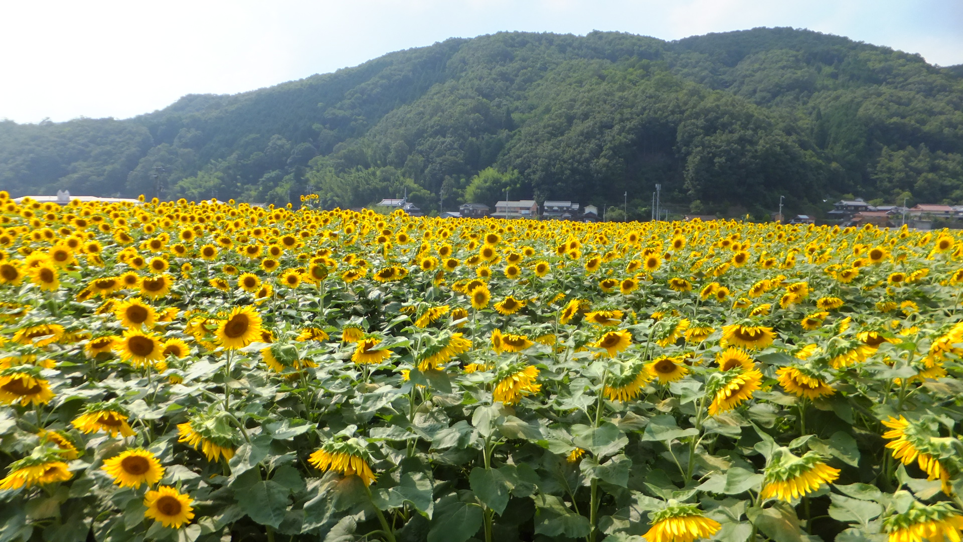 佐用町南光ひまわり祭り